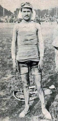 Henri Pélissier à ses débuts, en 1911.